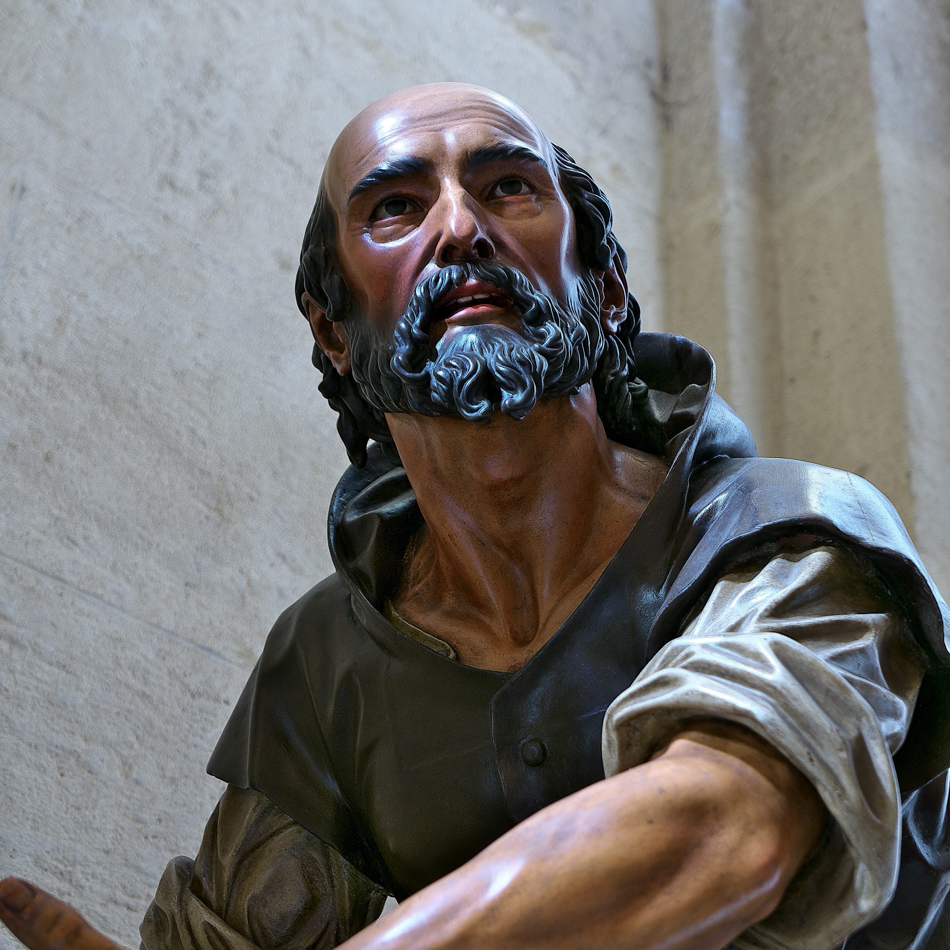 Sebastián Santos Rojas talla el Cirineo (1968) para la Hermandad de Pasión (Sevilla).